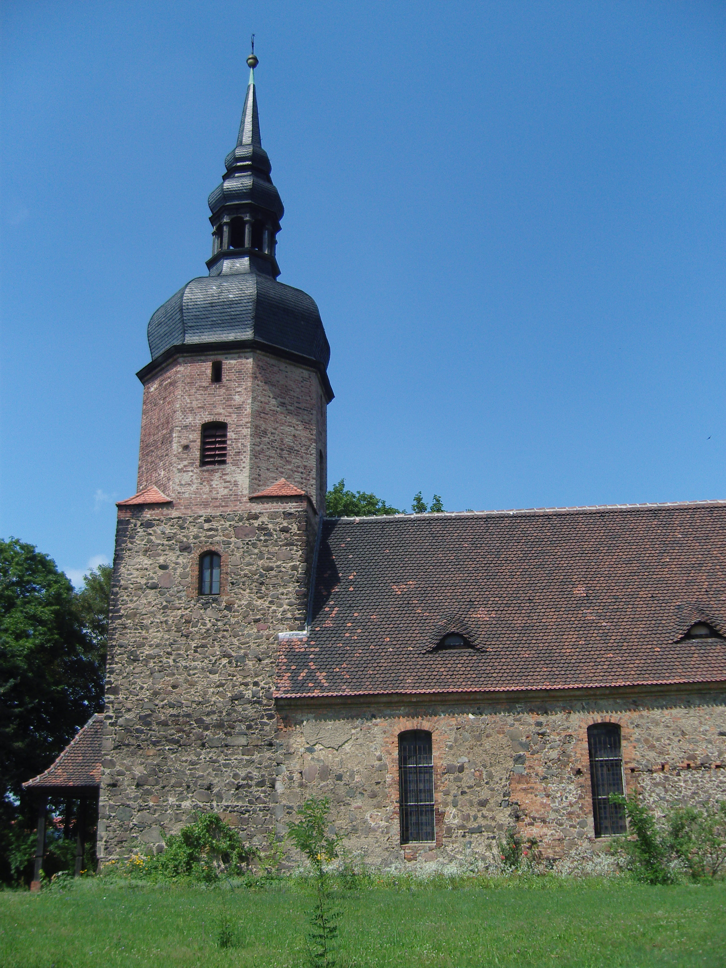 Dorfkirche in Neupetershain